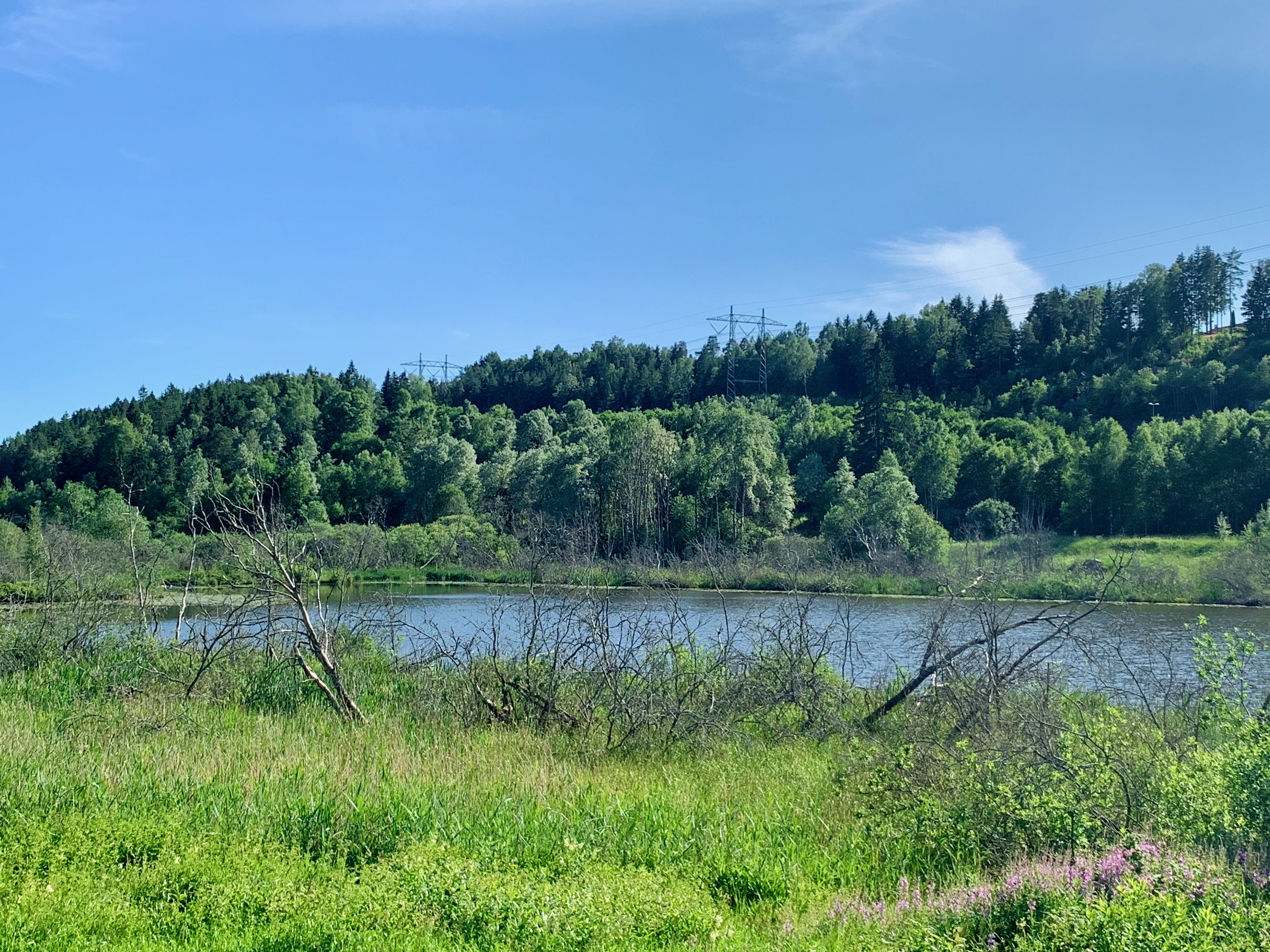 Gjersrudtjern i Oslo.